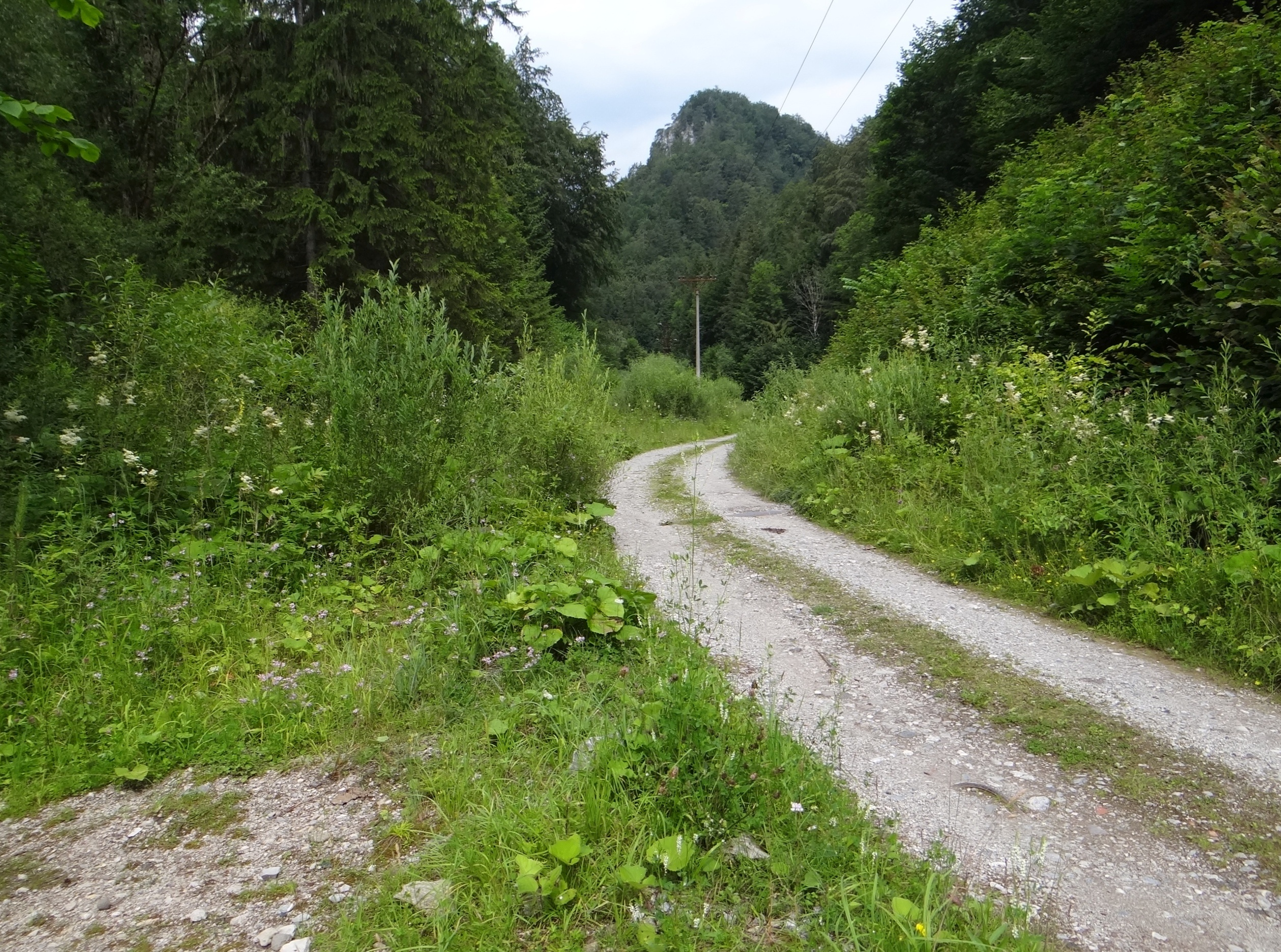 Bystrická dolina (Veľká Fatra))